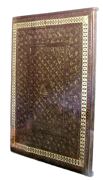 Okładka koranu z 1866 roku. Obiekt pochodzi ze zbioru Muzeum w Darłowie. Autor zdjęcia: Stimoroll.